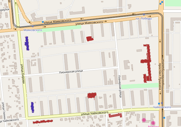 Kommunale Gebäude in Magnitogorsk, 1. Quartal